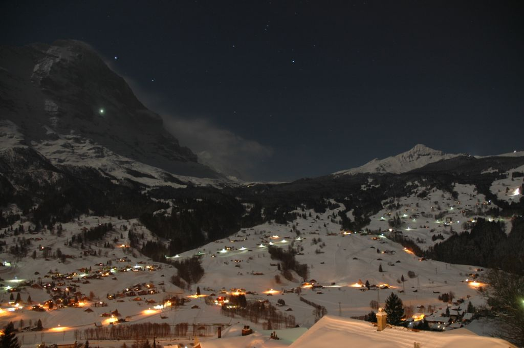 Grindelwald, Schweiz bei Vollmond mit Blick auf Eiger-Nordwand, Silberhorn und Kleine Scheidegg, Lauberhorn und Tschuggen